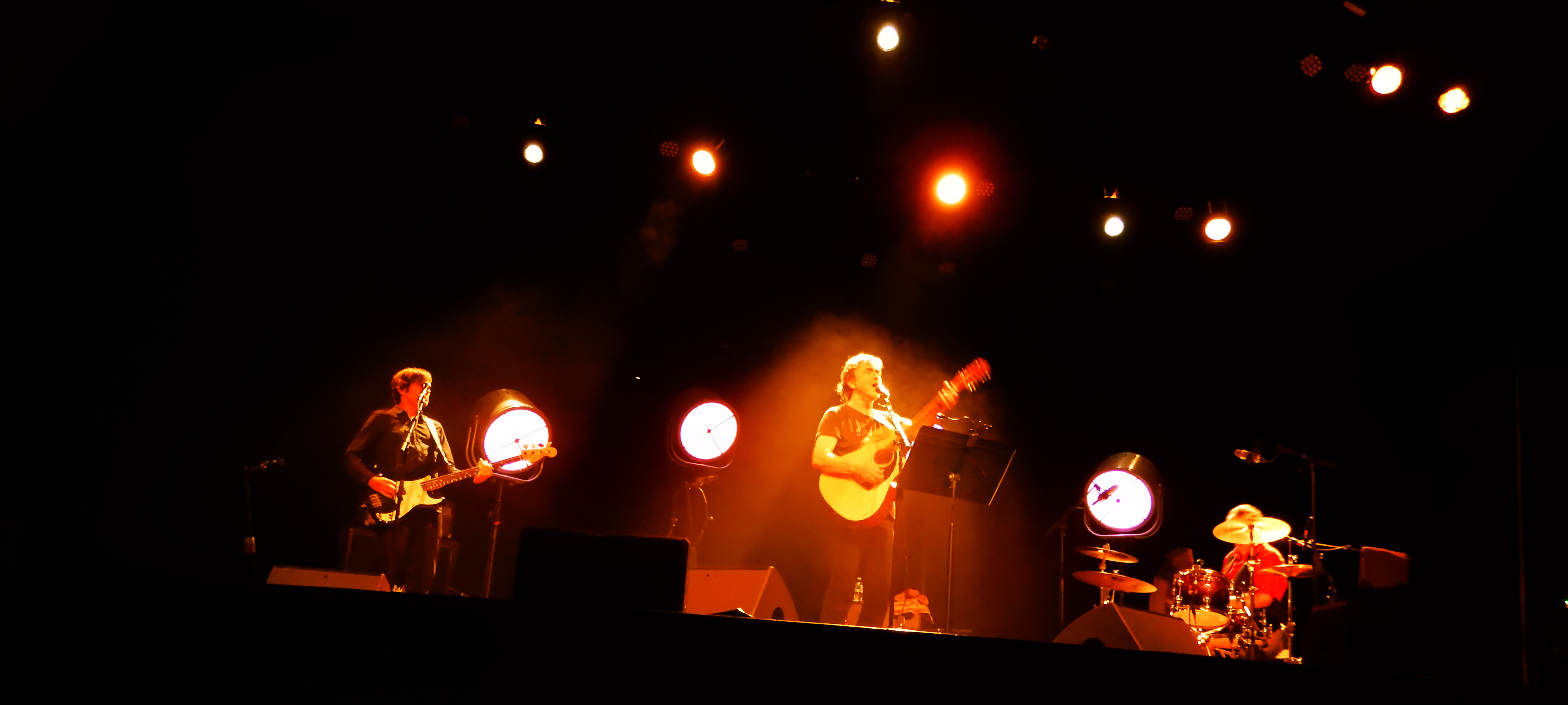 Jean-Louis Murat en concert à Changé (53), le 25 octobre 2019